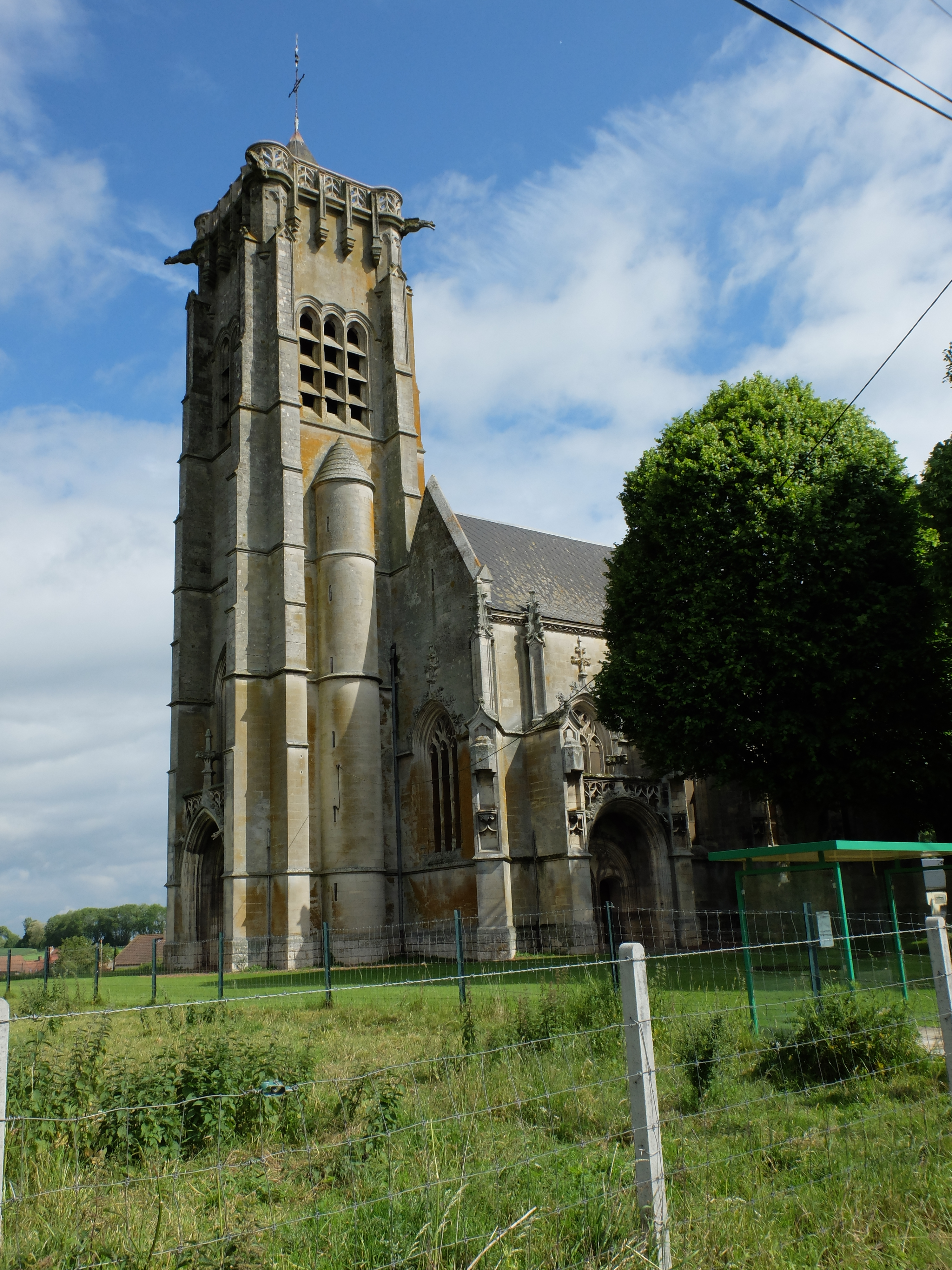 Vue de l'église d'Écoust-Saint-Mein.